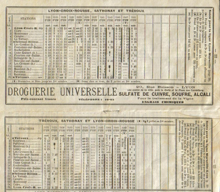 Tableau des dessertes de la ligne de chemin de fer Lyon - Trévoux pour l'été 1905. Reproduction (scan) des pages 22 et 23 du fascicule "Horaire Lyon & Région" édité par l'imprimerie E. Nicolas, à Lyon (cf. File:Brochure-horaires-Lyon-1905.jpg).